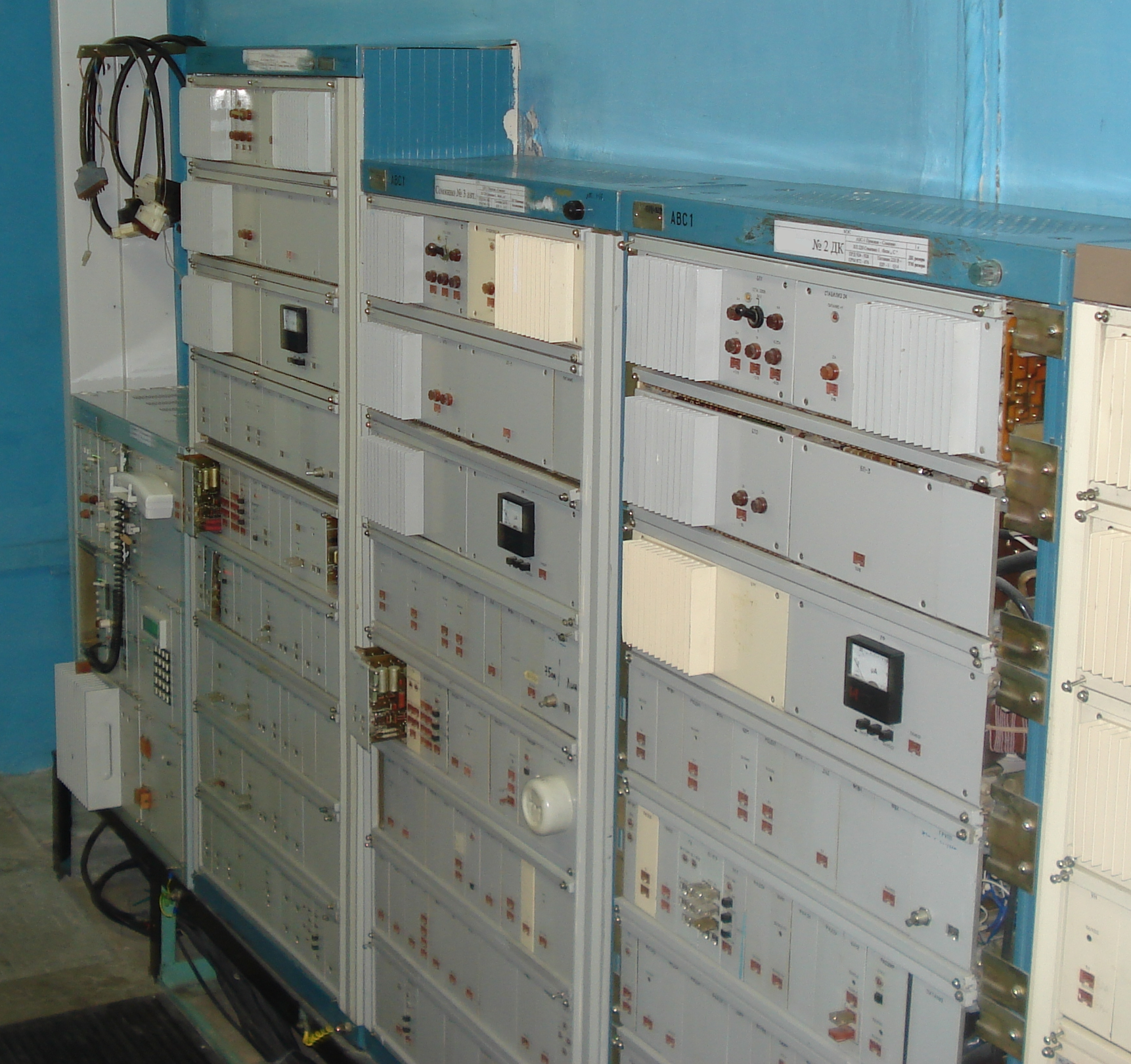 Приемопередатчики ВЧ-связи: АКСТ «Линия-М» (слева) и АВС.